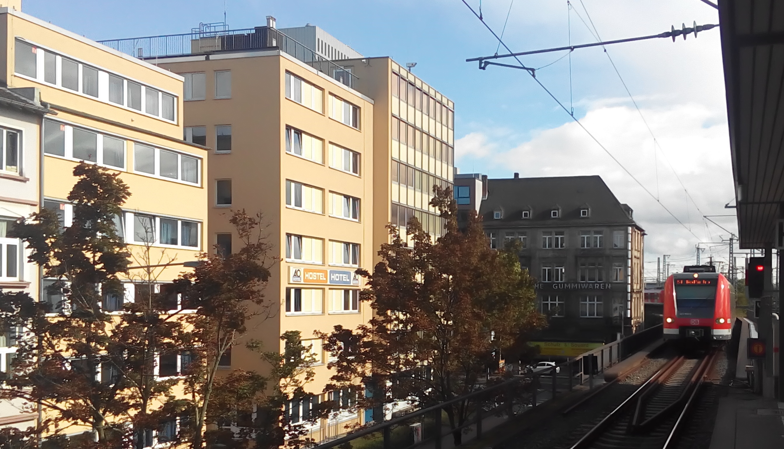 A&O Hotels and Hostels in Frankfurt-Galluswarte (S-Bahnhof)